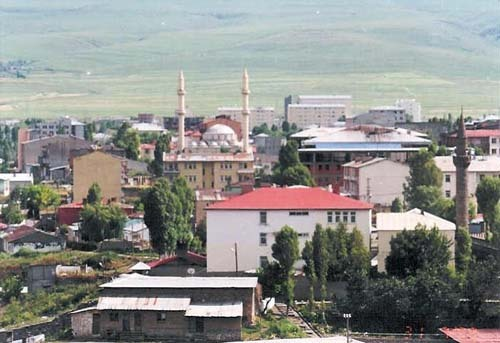 GÖLE Merkez